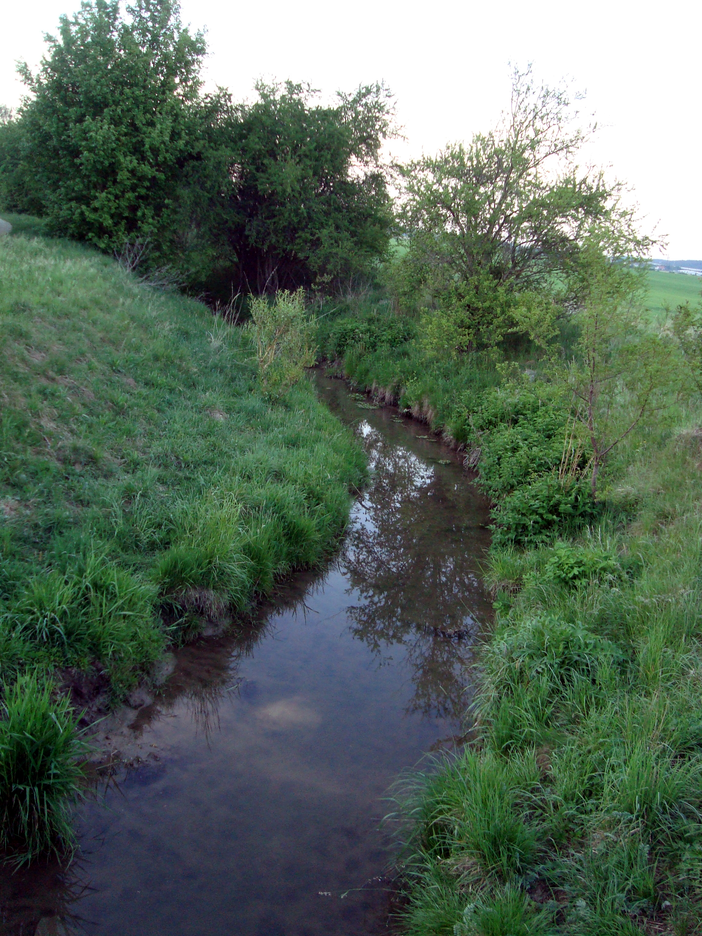 Říčanský potok v Rosicích